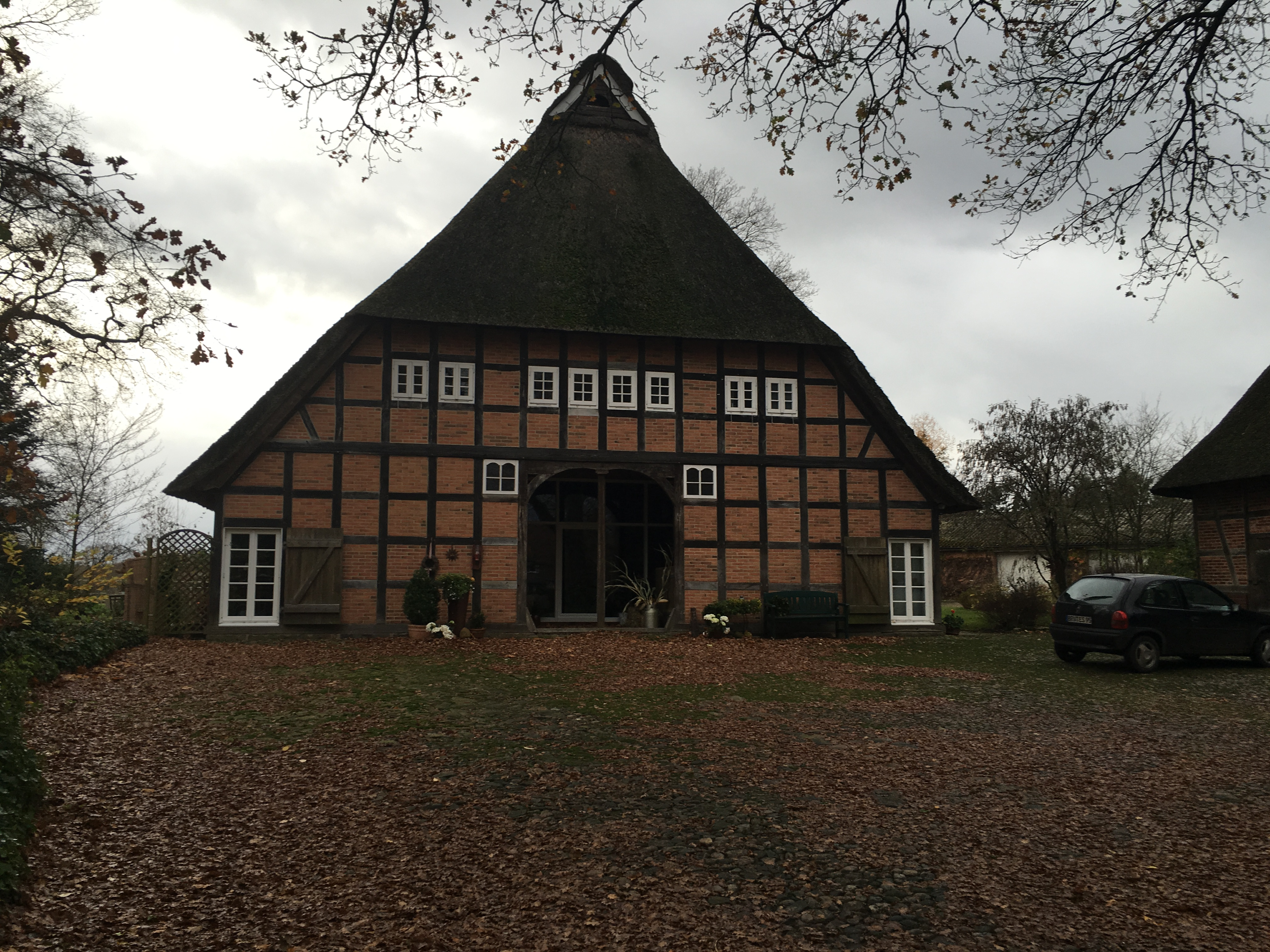 Fackwarkhuus in Barchel